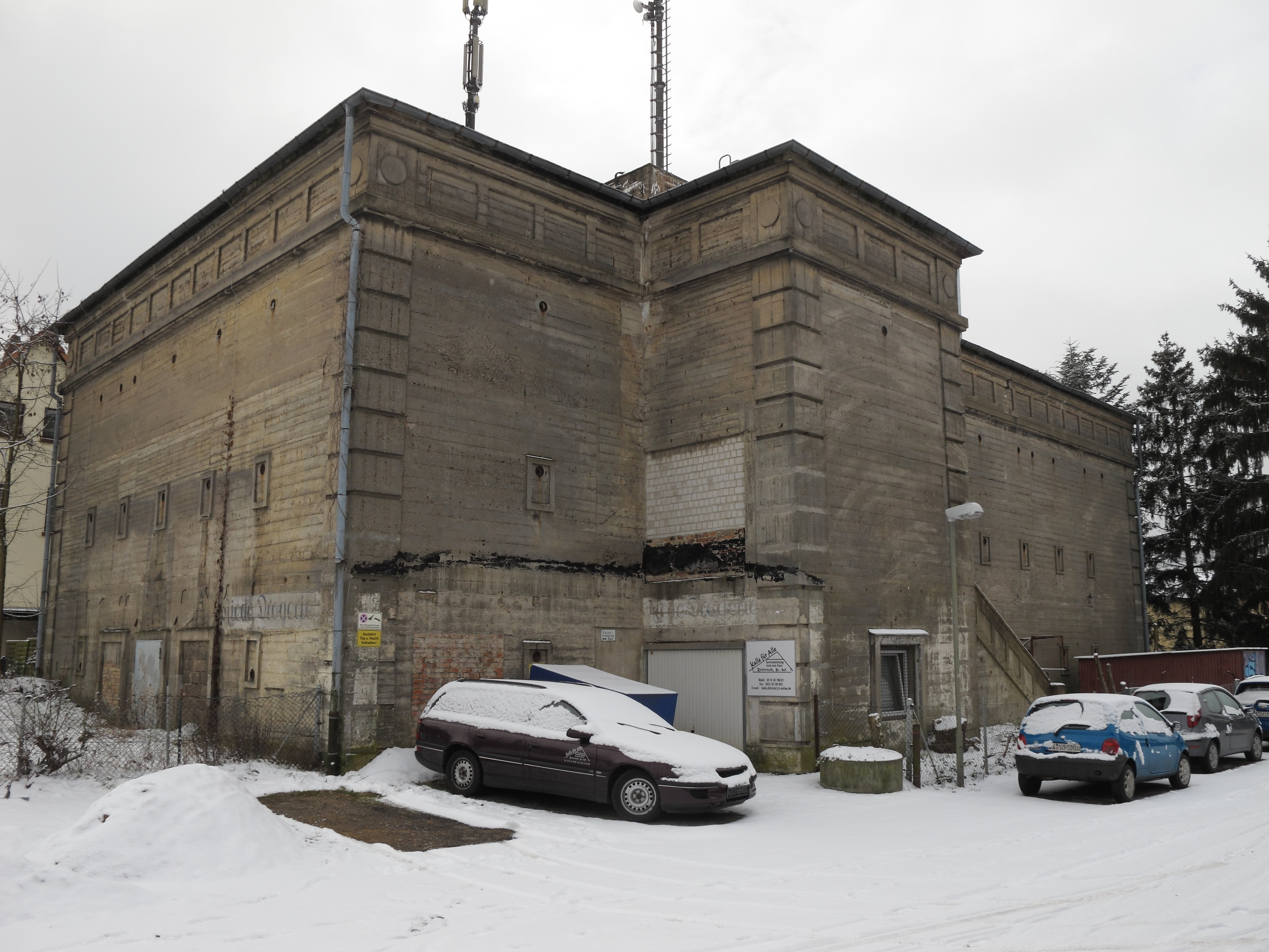 Braunschweig: Hochbunker Kralenriede Ecke Erikaweg